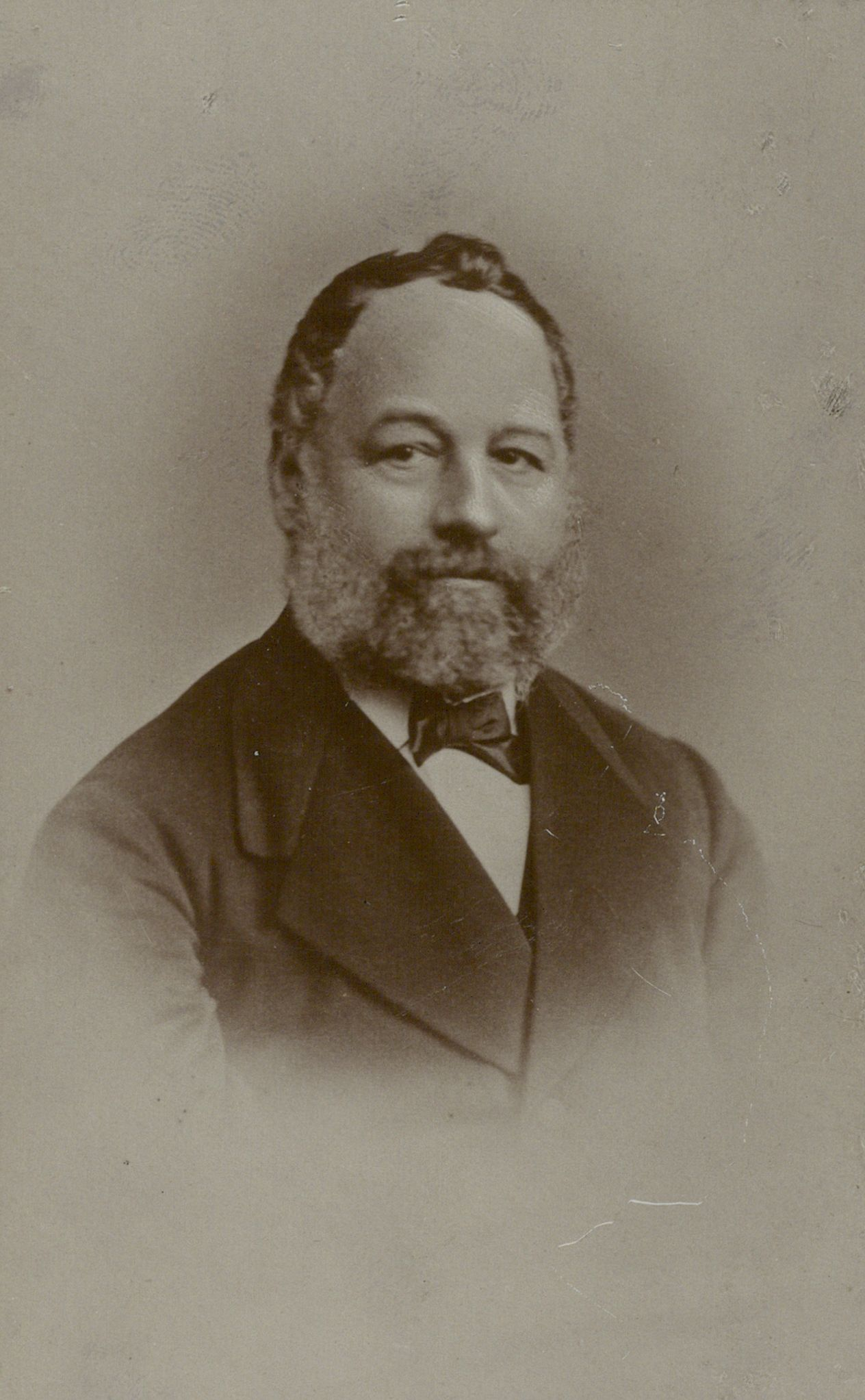 Porträt von Theodor von Landauer (1816-1894)